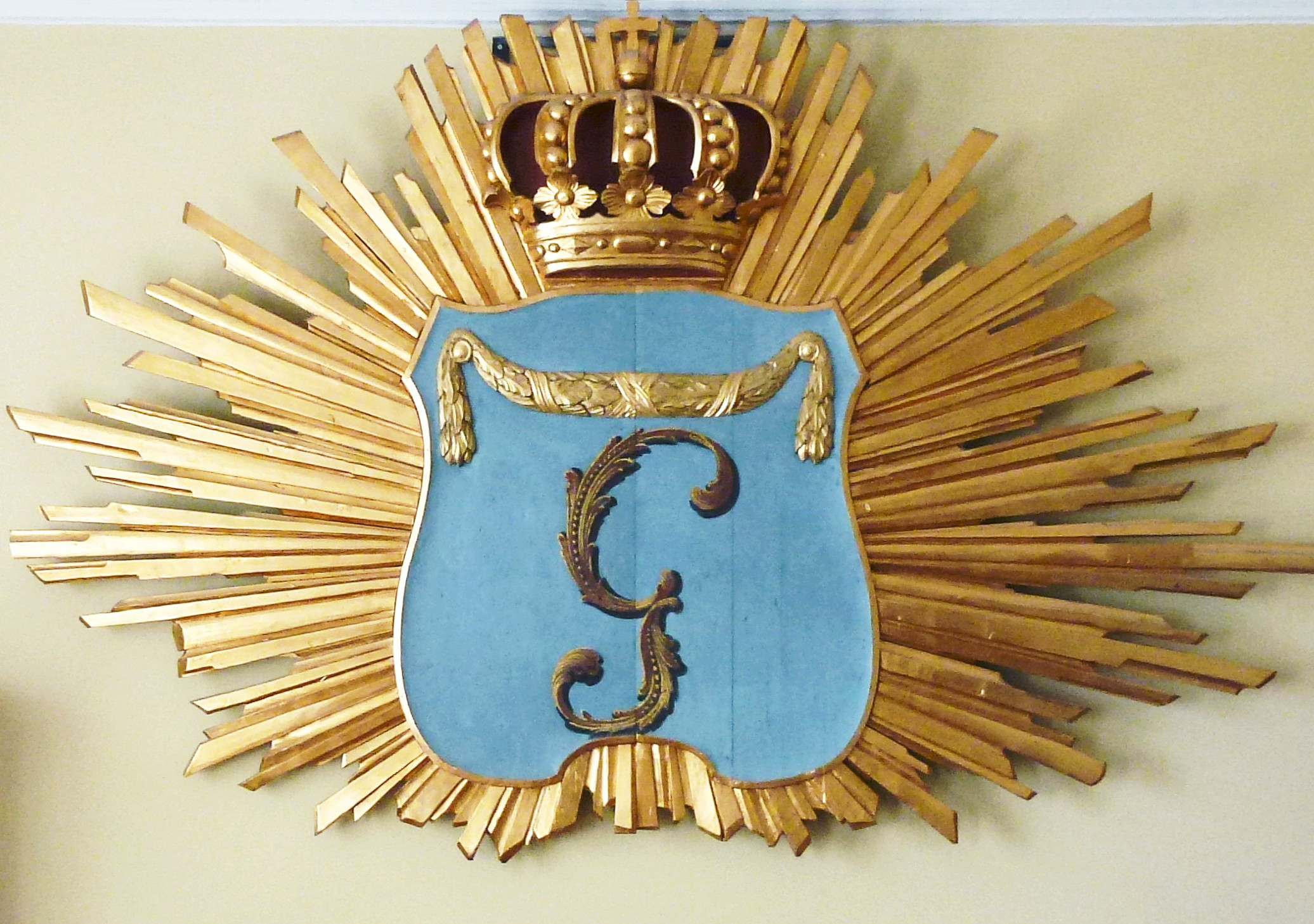 Edsbergs slott Gula saongen, Gustav III:s bröllopssköld